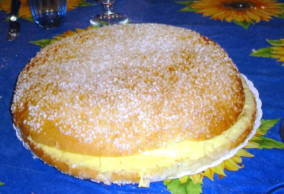 Tarte tropezienne achetée à Cogolin